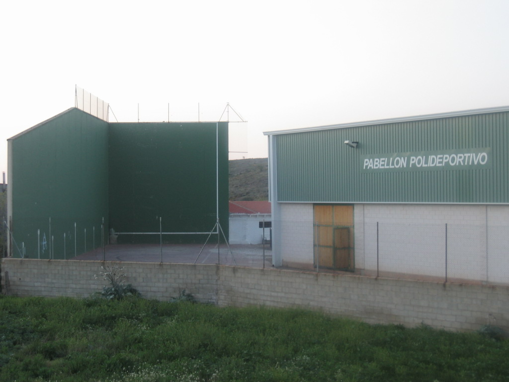 Polideportivo Paniza